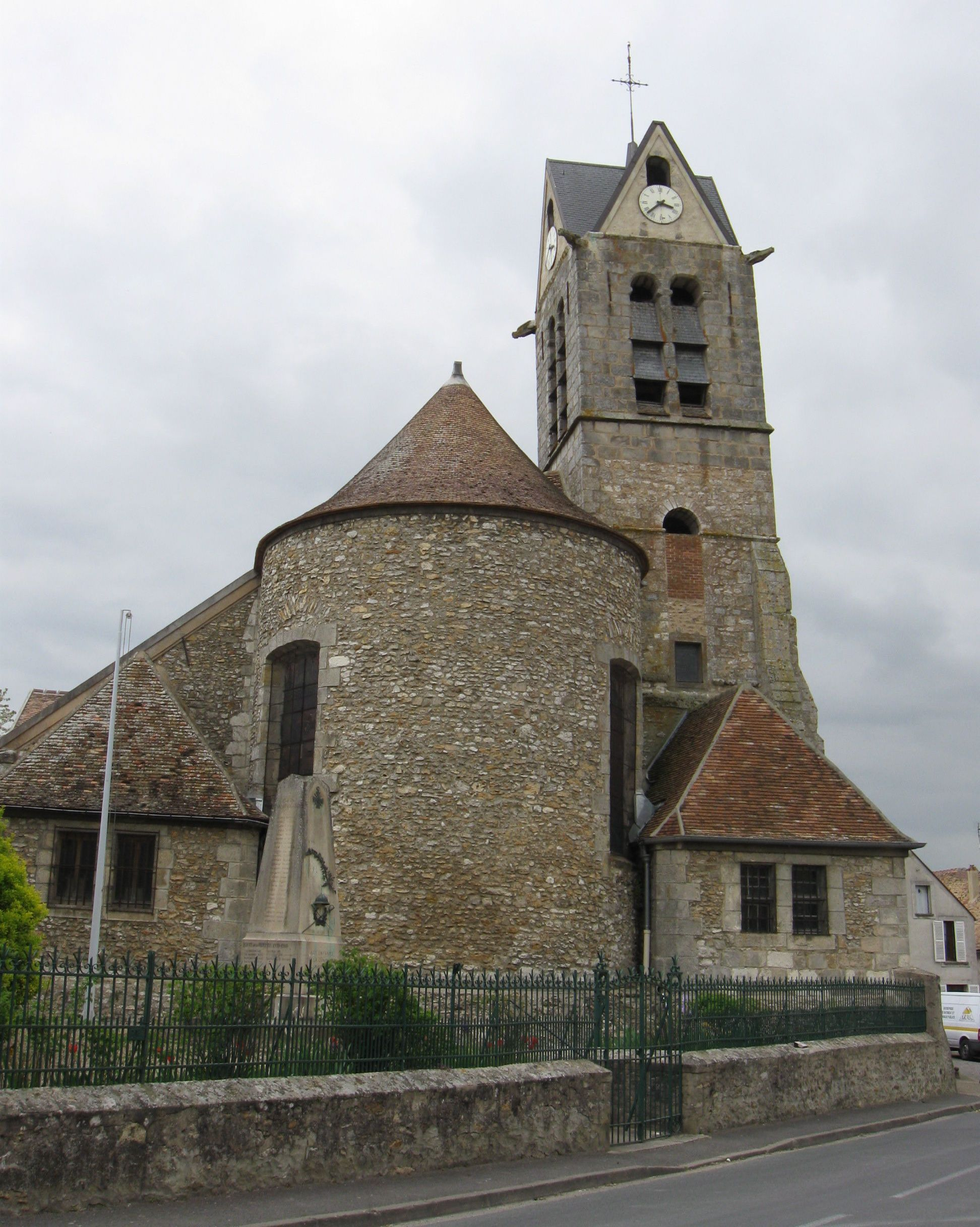 Église Saint-Étienne de Maincy (façade orientale). ( Seine-et-Marne, région Île-de-France).